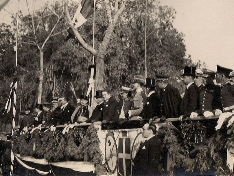 Visita del príncipe Humberto II de Italia. Foto perteneciente a la familia del Dr. Rafael Núñez.